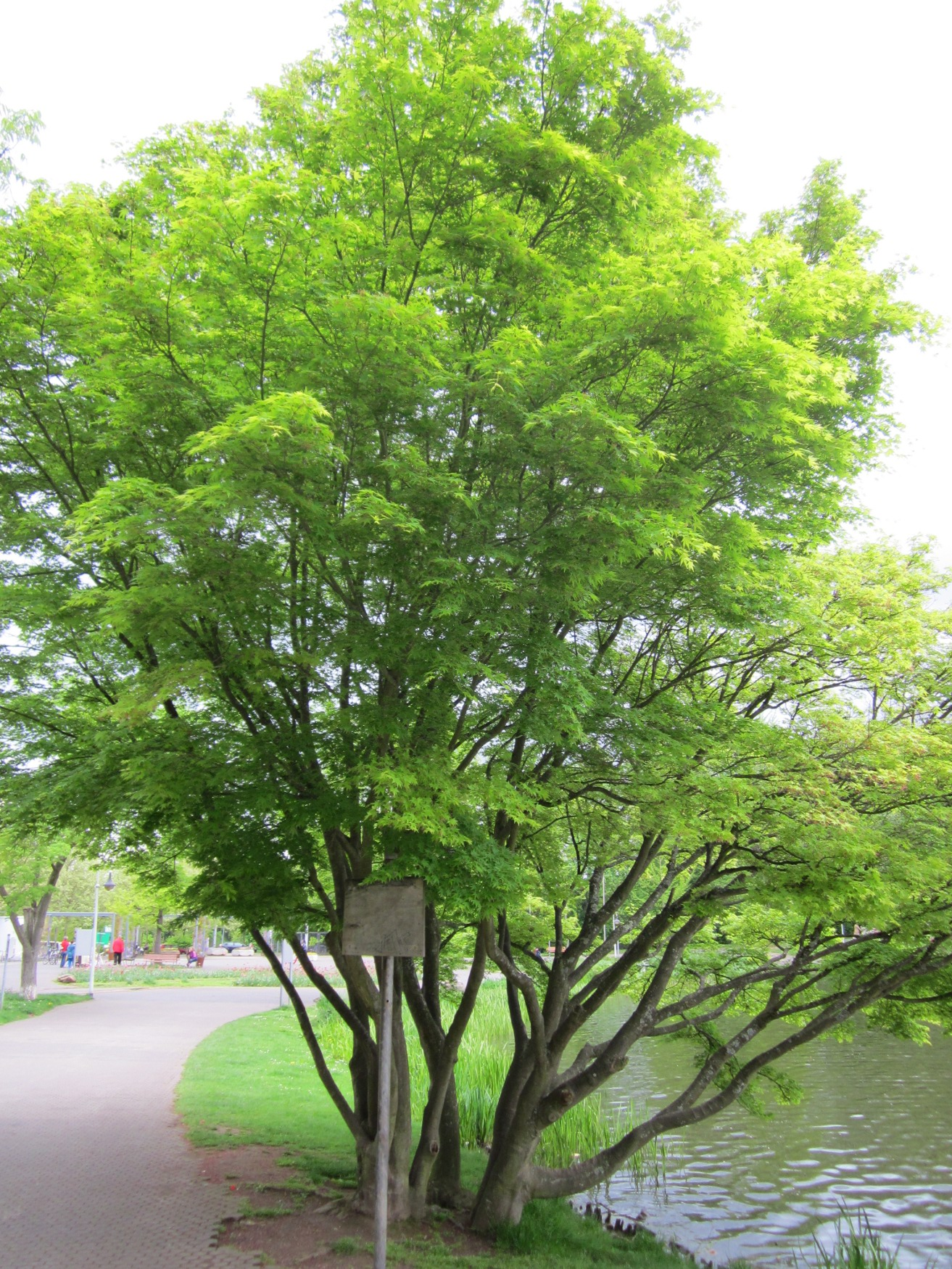 Fächer-Ahorn (Acer palmatum) im Deutsch-Französischem Garten in Saarbrücken